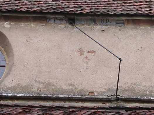 Vestiges d'un ancien cadran solaire , église des Récollets de Rouffach